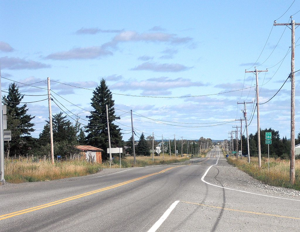 Vue sur la route 386, à Amos, en Abitibi.